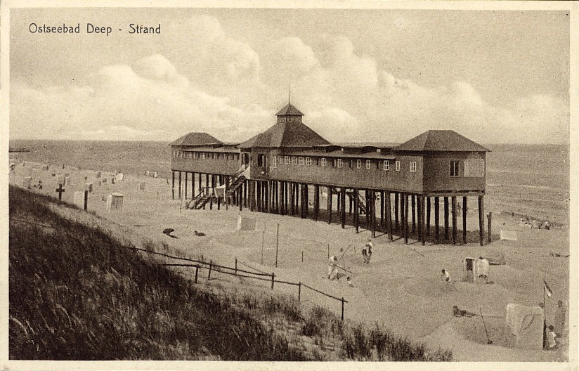 Der Strand in Ostseebad Deep Rega-Mündung, heute dorf Mrzeżyno in Polen